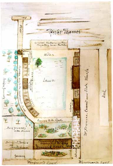 Brunswick House Plan um 1860. Ohne Autor.